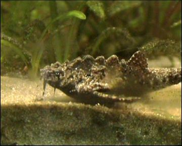 Bunocephalichthys verrucosus verrucosus, Bunocephalus verrucosus verrucosus Hoher Bratpfannenwels, Hochrückiger Bratpfannenwels, Großkopf Bratpfannenwels